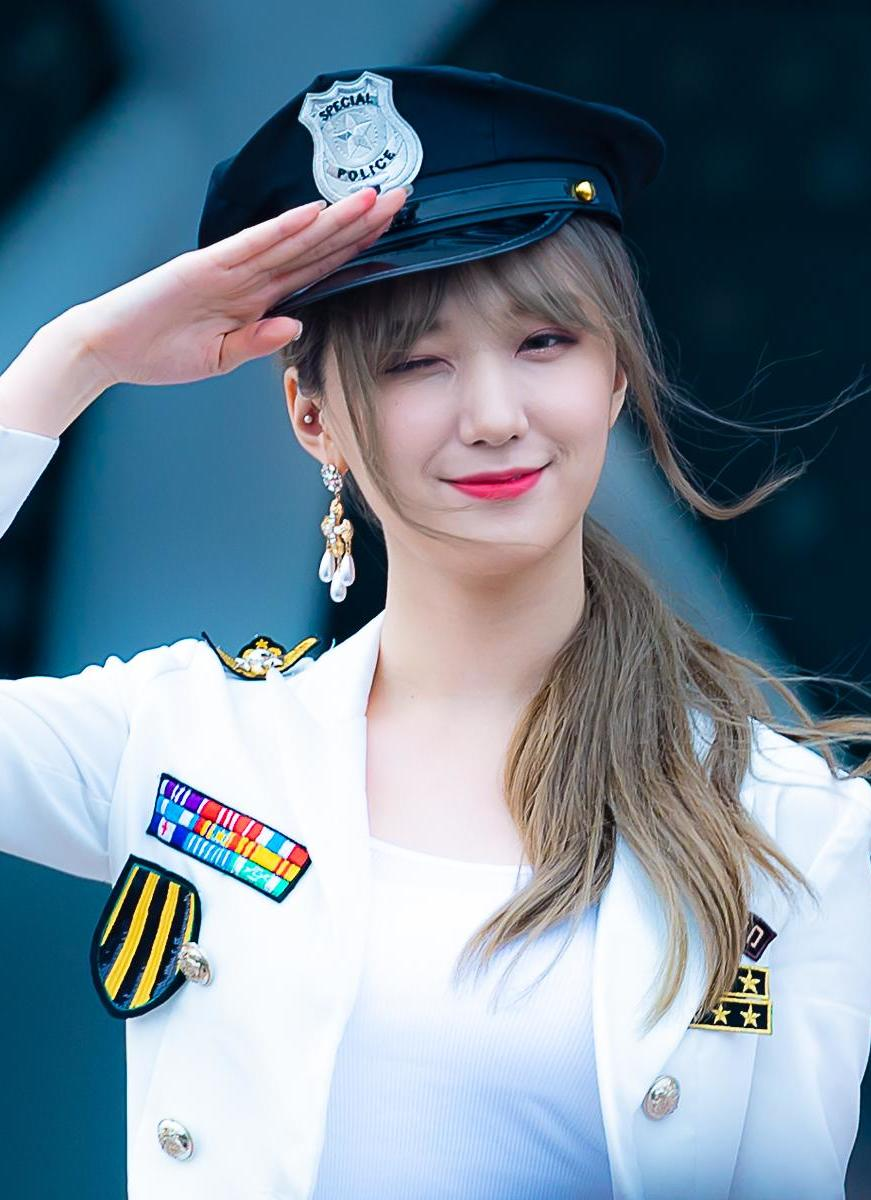 180617 프리스틴V 팬사인회